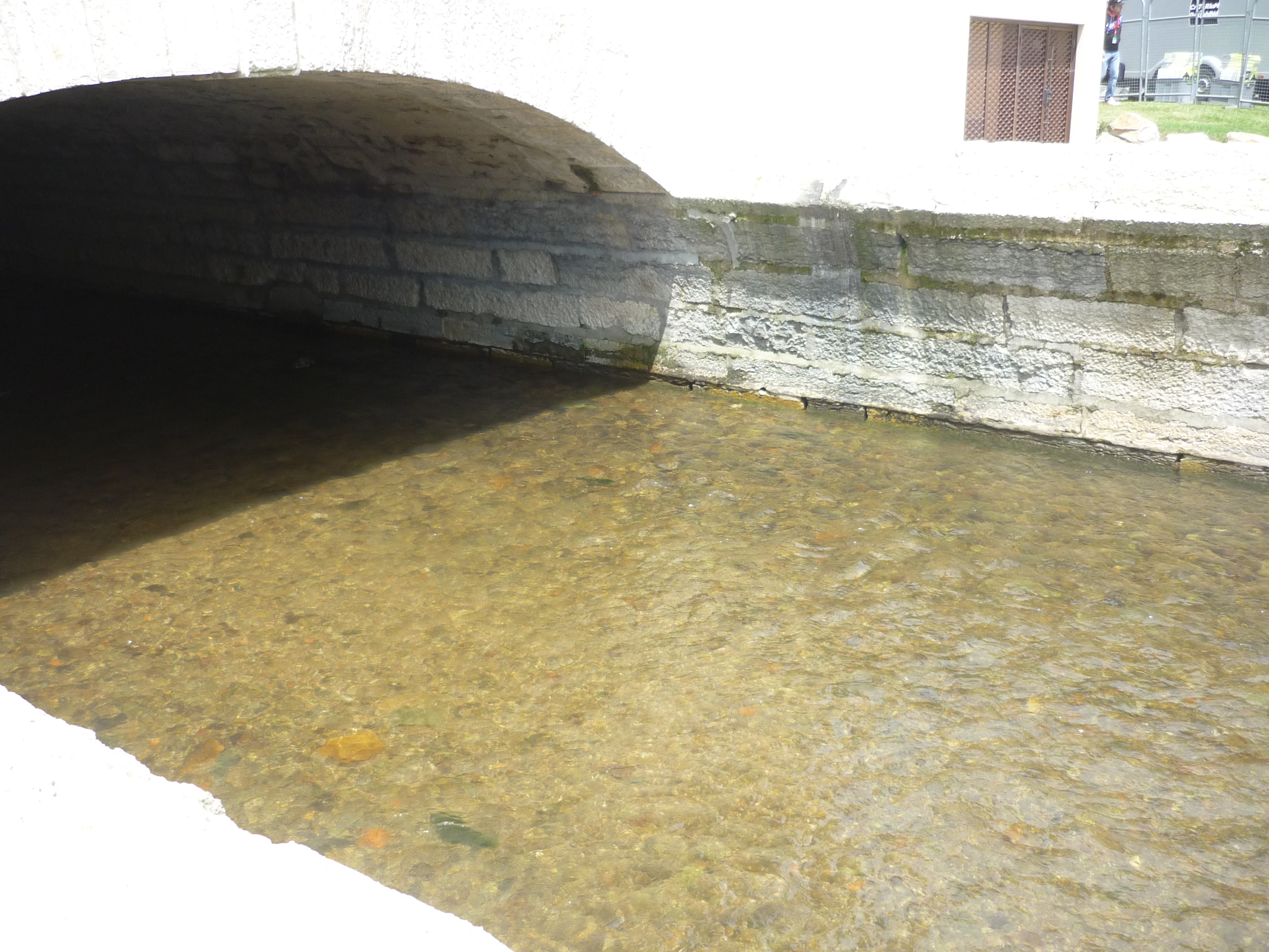 La rivière Turdine à Tarare, dans le département du Rhône, en France